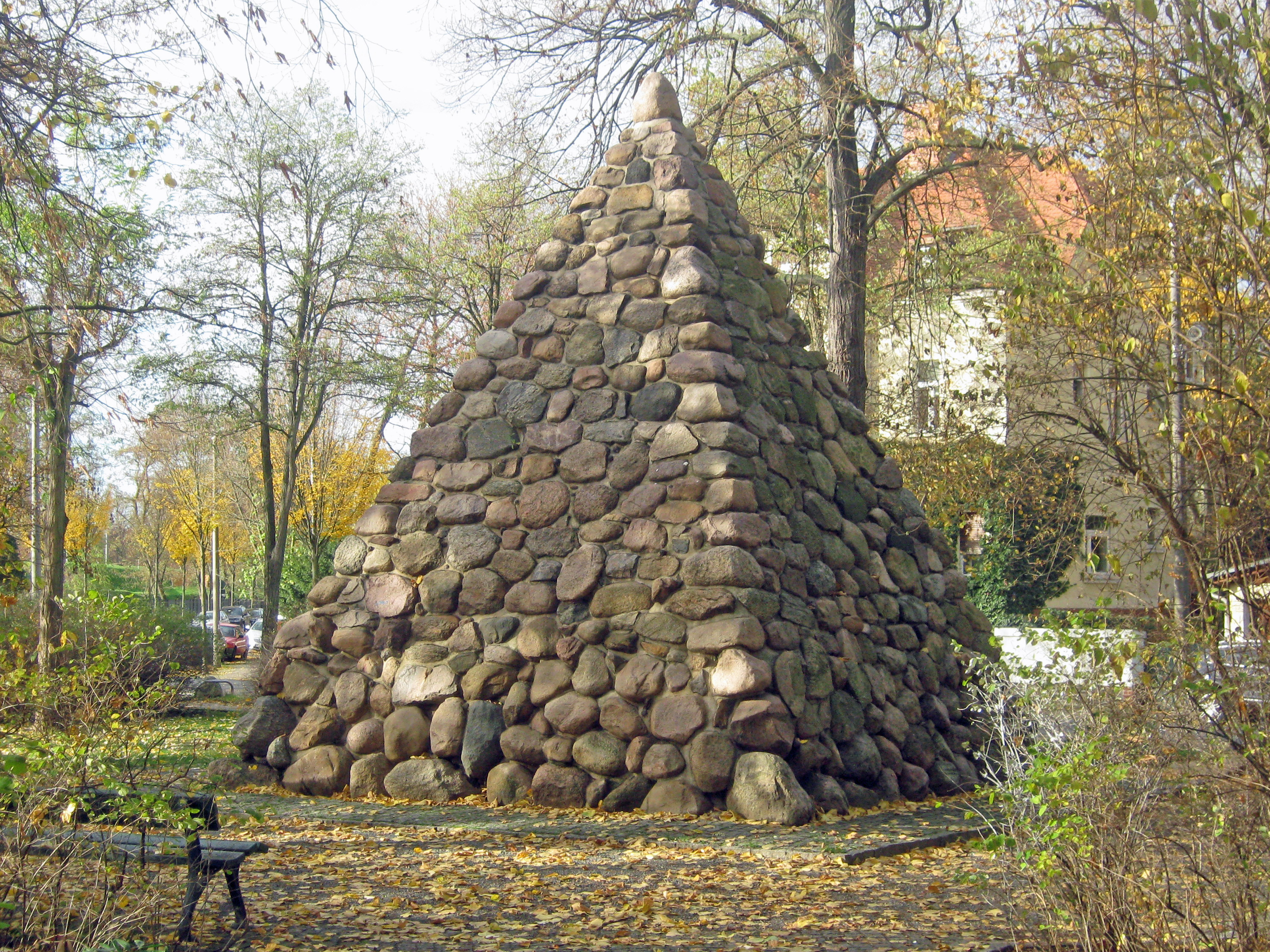 Auf den Gustav-Schwabe-Platz befindet sich die Gletzscherpyramide, welche aus 550 Findlingssteinen erbaut wurde. Die zu den Kulturdenkmälern von Leipzig gehörende Pyramide wurde 1903 von der Allgemeinen Deutschen Credit-Anstalt und der Leipziger Immobilien Gesellschaft erbaut.